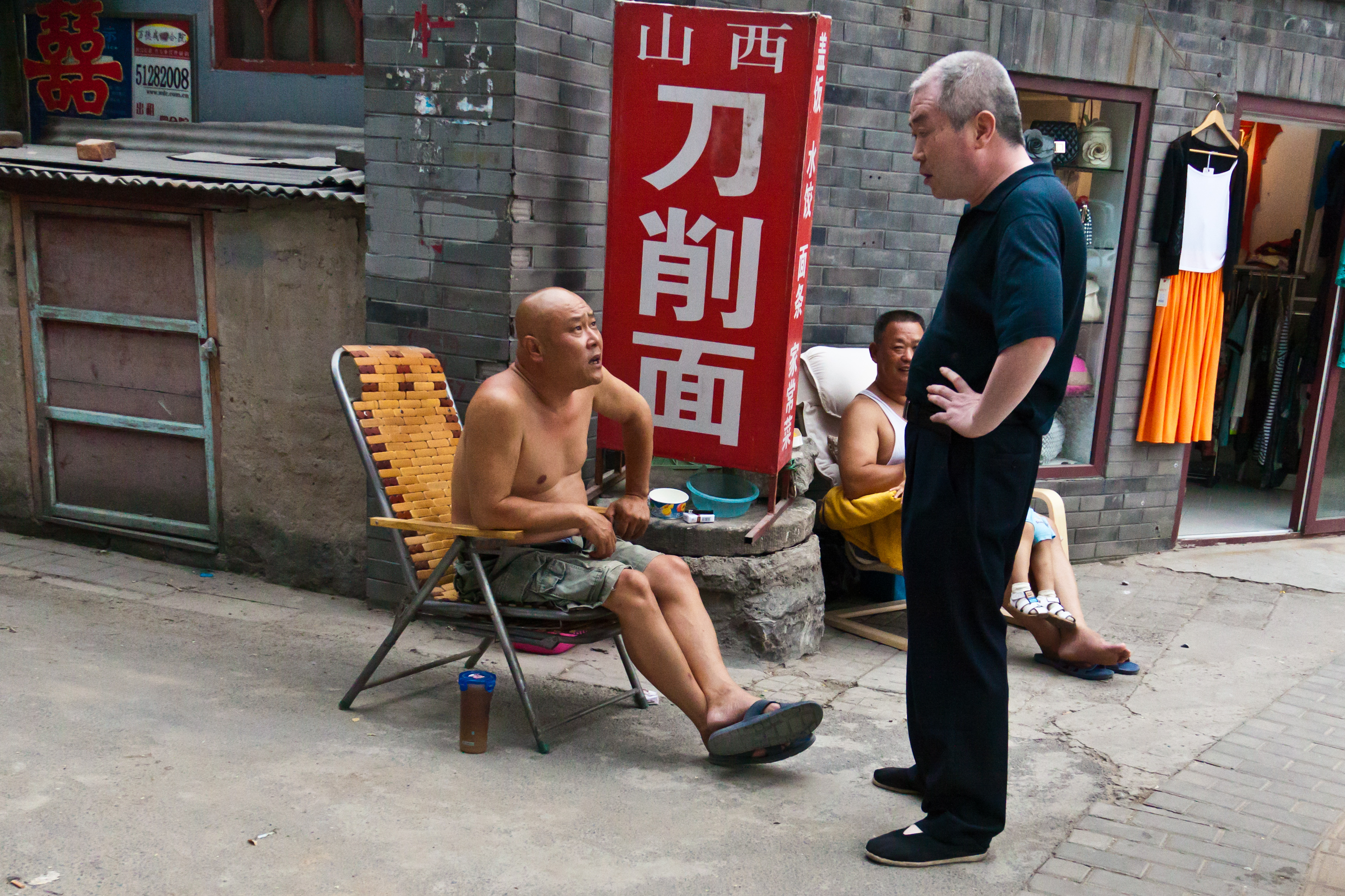 北京人 / Beijing people / Пекинцы